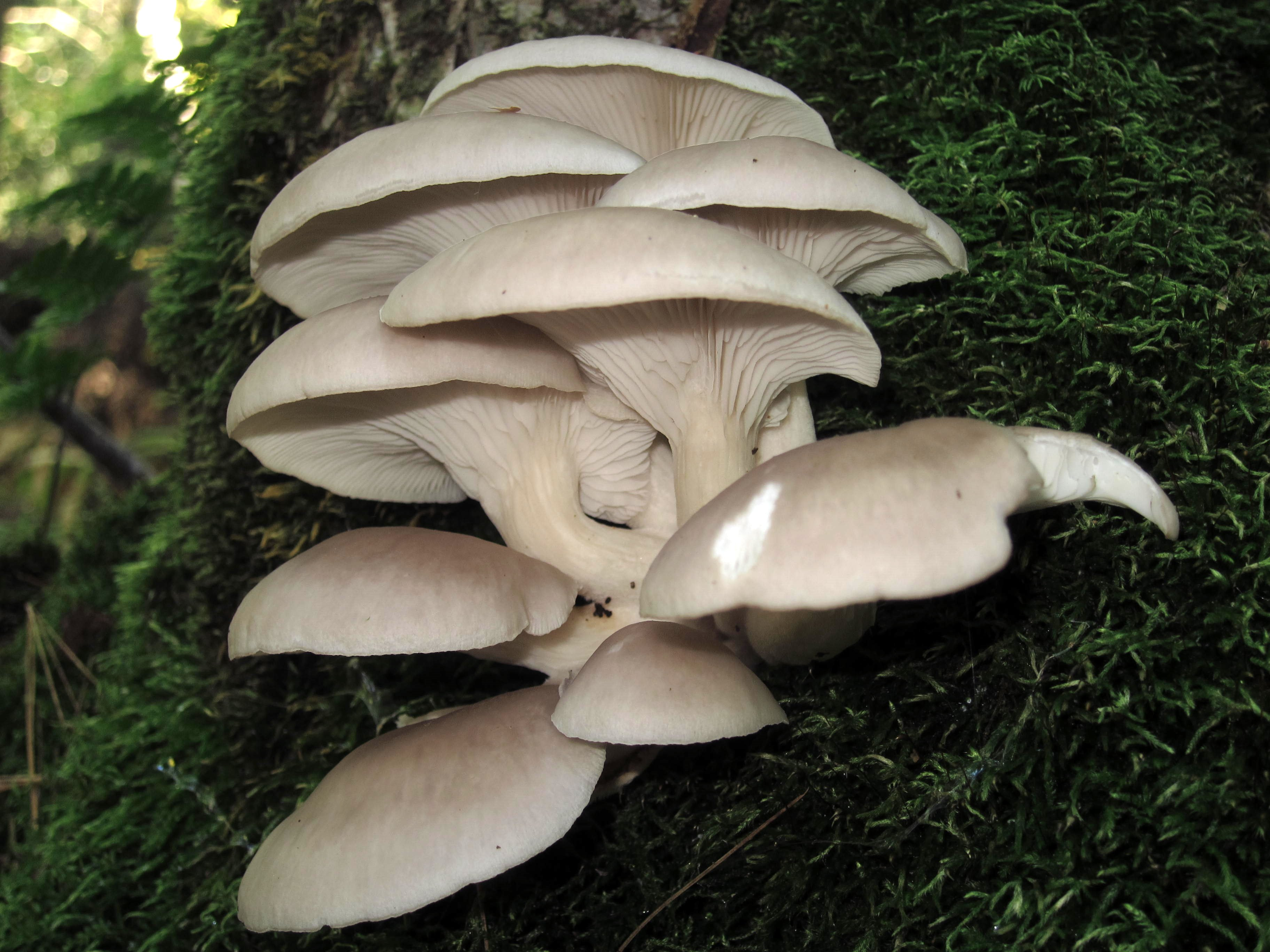 poussent sur un arbre mort debout wikipedia Le pleurote en huitre pousse de l'automne à l'hiver selon les régions, en touffes sur les feuillus vivants ou tombés. C'est un parasite de blessure mais il est également saprophyte. Comestibilité[modifier] C'est un comestible honorable, si l'on n'est pas rebuté par la flaccidité de sa chair. Contrairement aux cèpes ou au girolles, il ne se suffit pas vraiment à lui-même simplement poêlé, il bénéficiera largement d'être cuisiné de manière plus élaborée, en mélange ou en accompagnement.